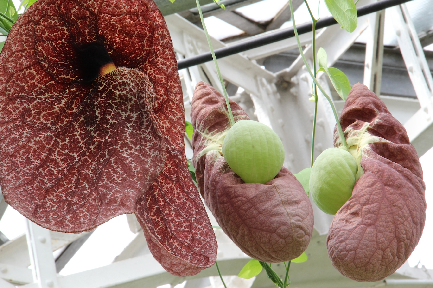 Aristolochia gigantea aus Brasilien